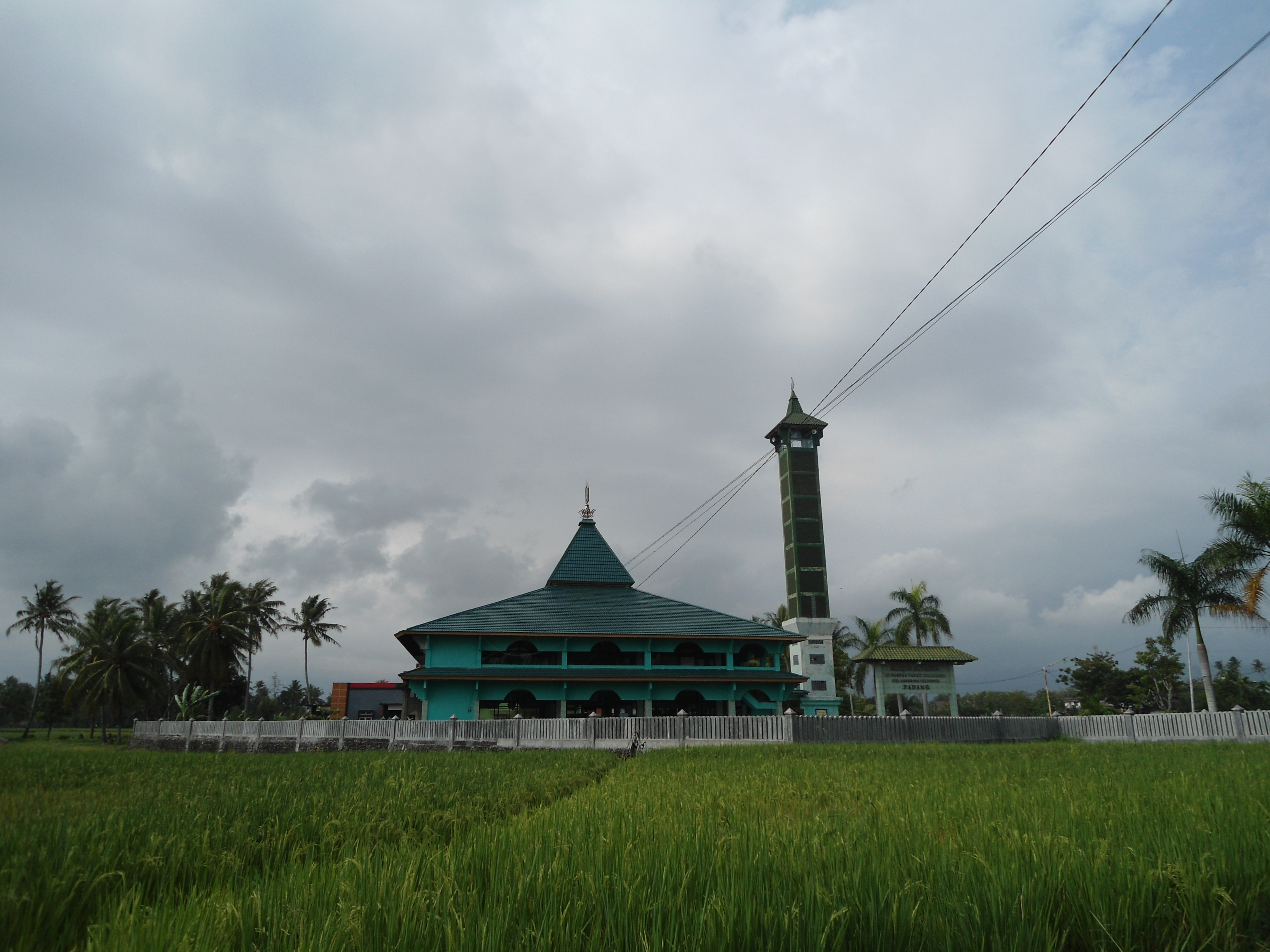 Masjid Al-Bahri di Kota Padang, Sumatera Barat, Indonesia